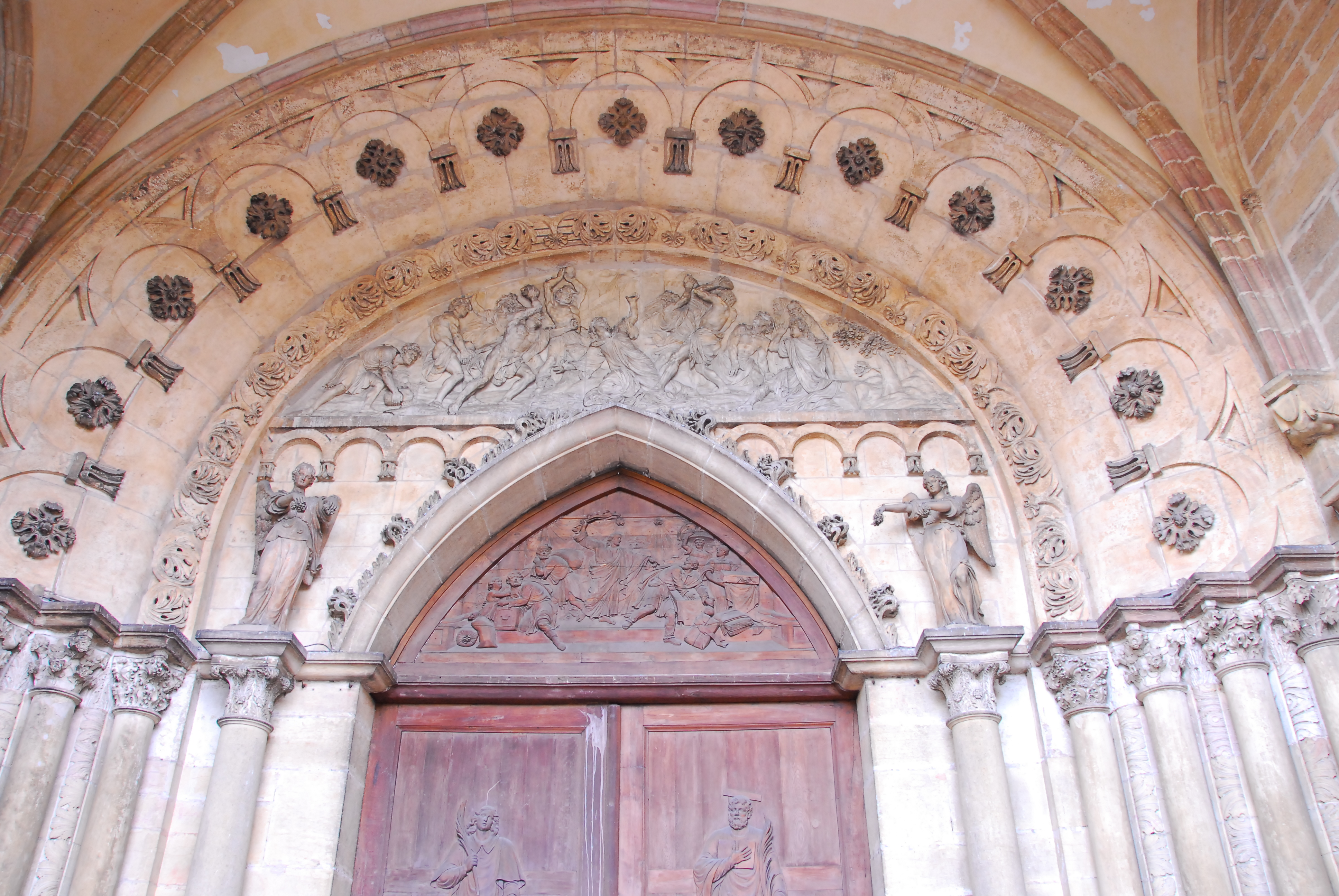 St-Bénigne,Kirche, Hauptportal